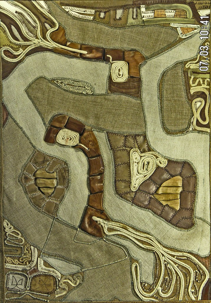 Центральная часть свитка